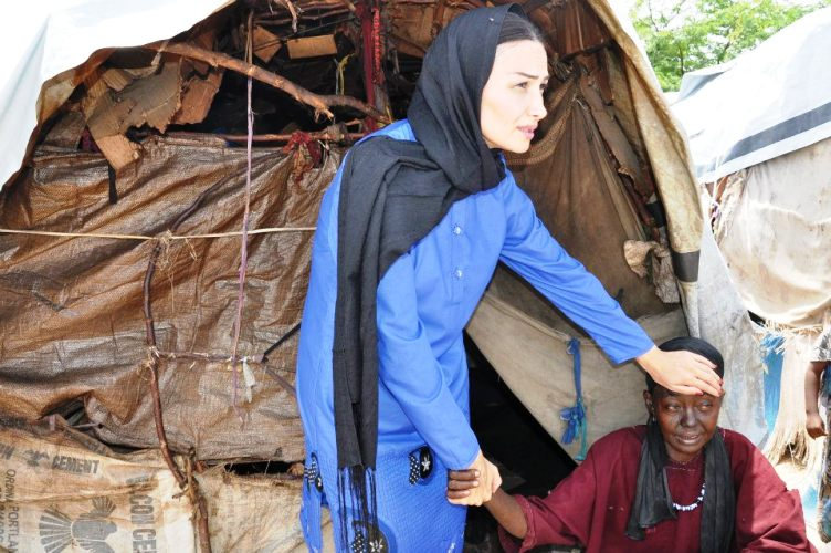 Deputat Qənirə Paşayeva Somalidə